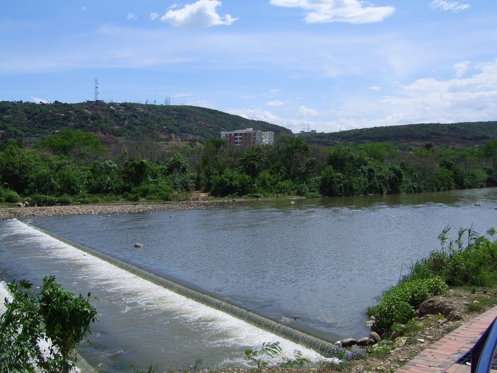 Río Pamplonita - Cúcuta, Colombia